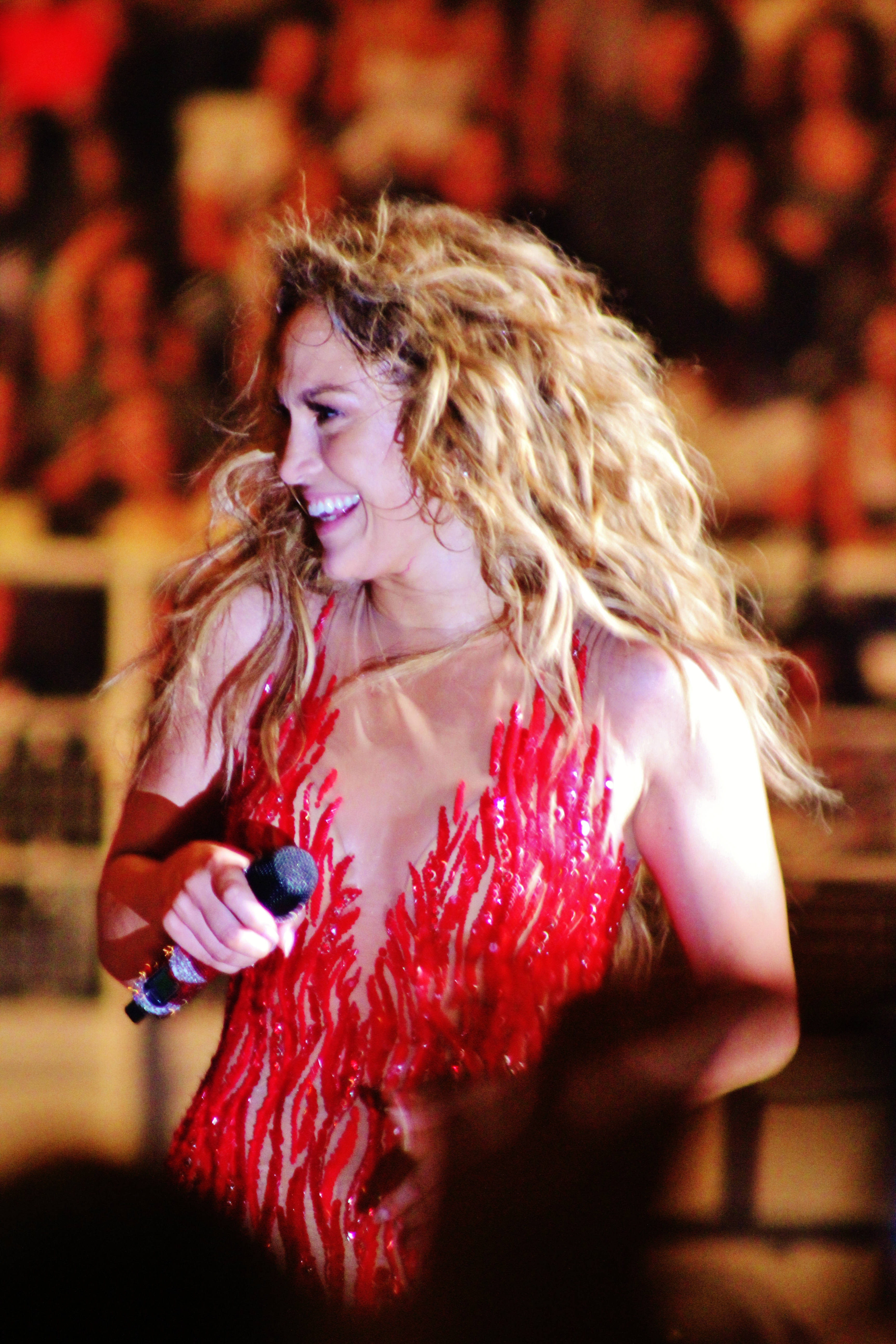 ITALY - AUTUMN 2012